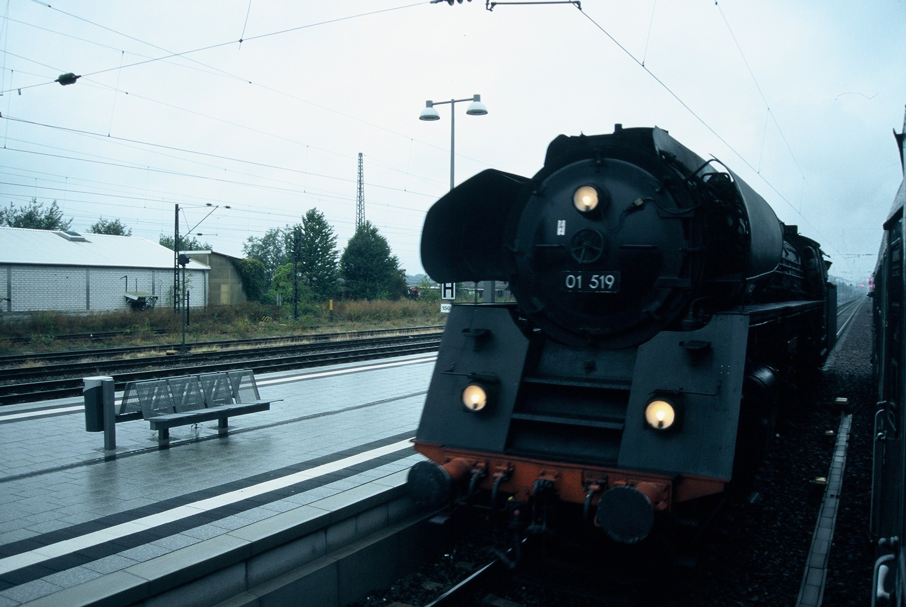 Dampflokomotive 01 519 der Ulmer Eisenbahnfreunde beim Plandampf 2005 in Schifferstadt.